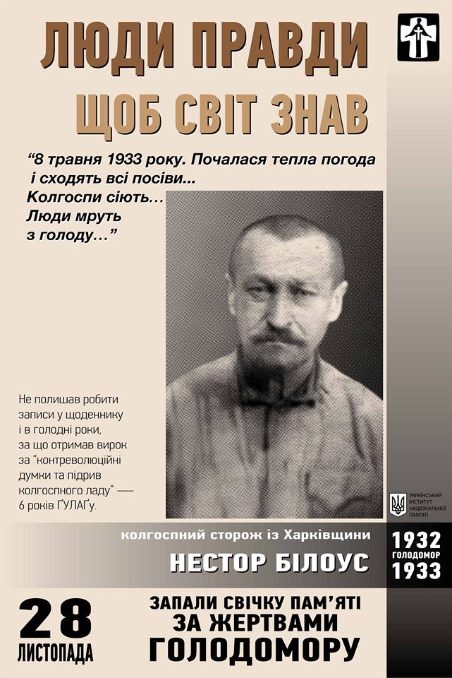 Люди Правди. Серія плакатів про тих, хто, ризикуючи кар’єрою, свободою або навіть життям, зробили все, щоб зберегти та поширити правдиві відомості про Голодомор. Щоб світ знав.